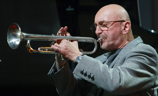 Tomasz Stańko, polish jazz trumpeter